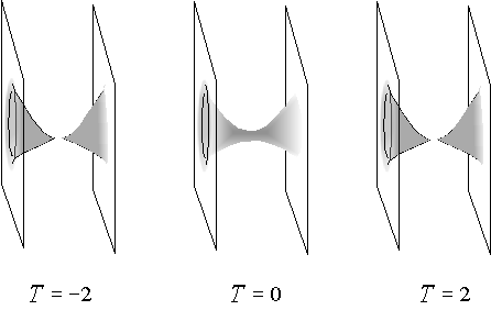 Пространственно-подобные сечения решения Шварцшильда